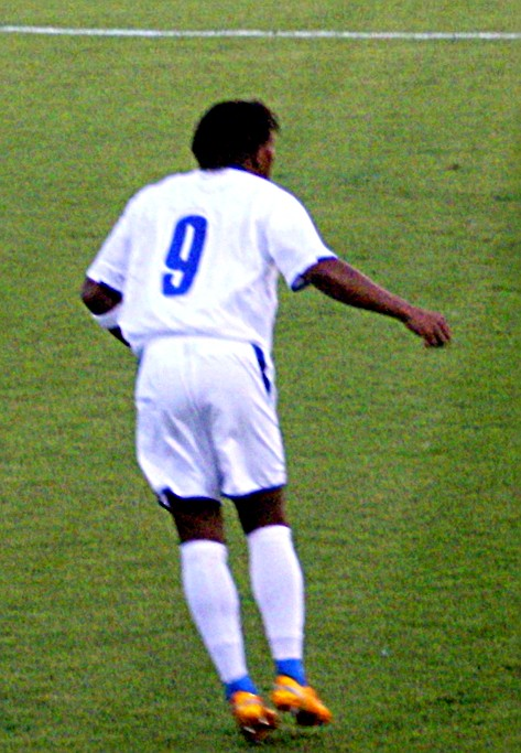 Carlos Pavon con su camiseta # 9.